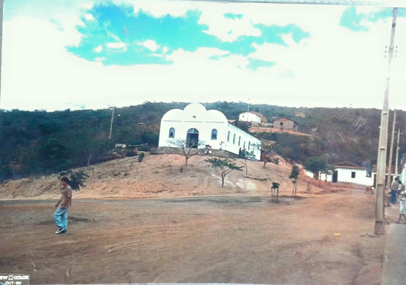 Água Branca de Minas em outubro de 1990 vista da Praça Sagrada Família